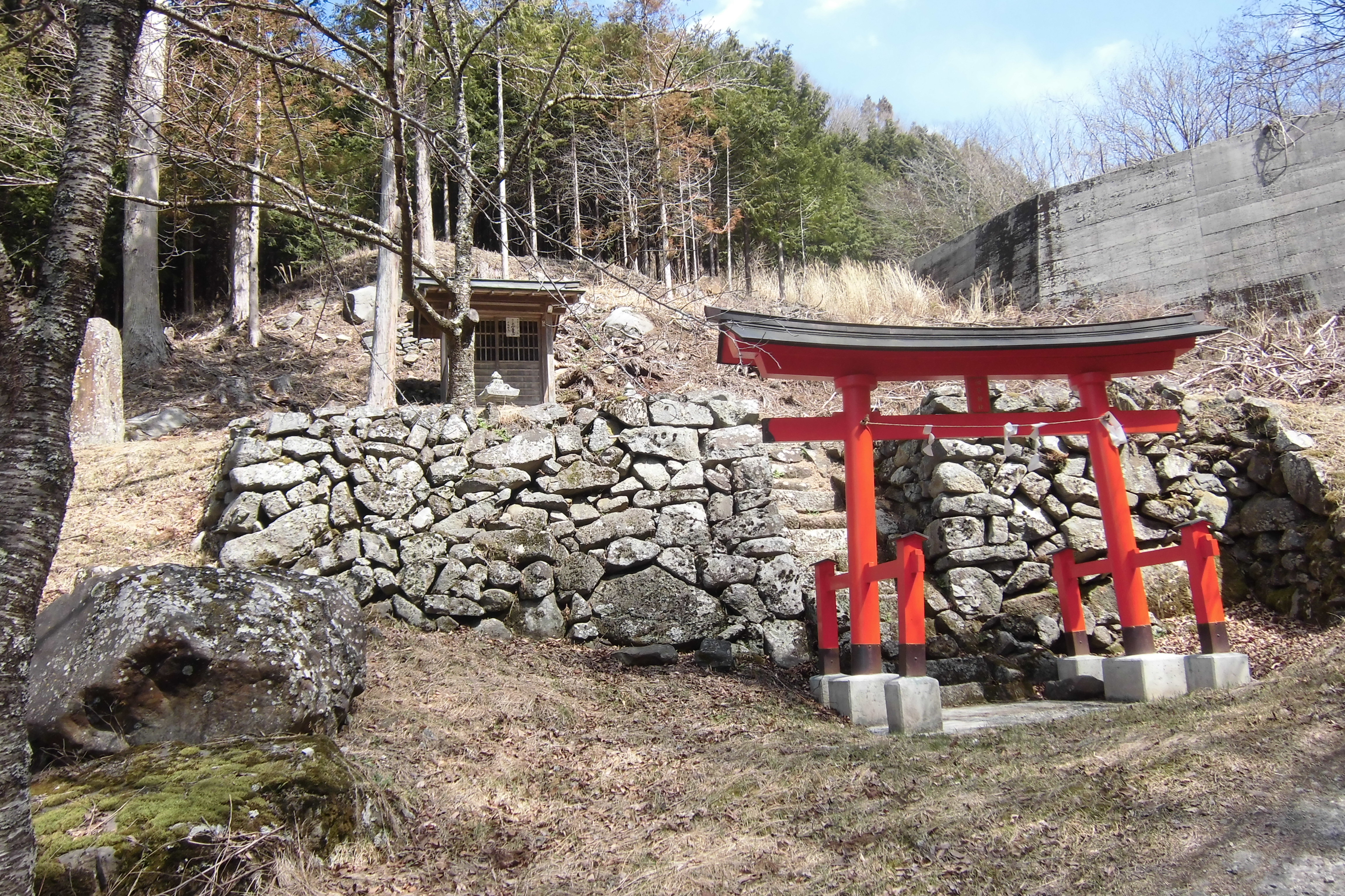 細草神社（甲府市竹日向町）